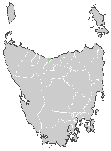 Devonport sur la carte de Tasmanie